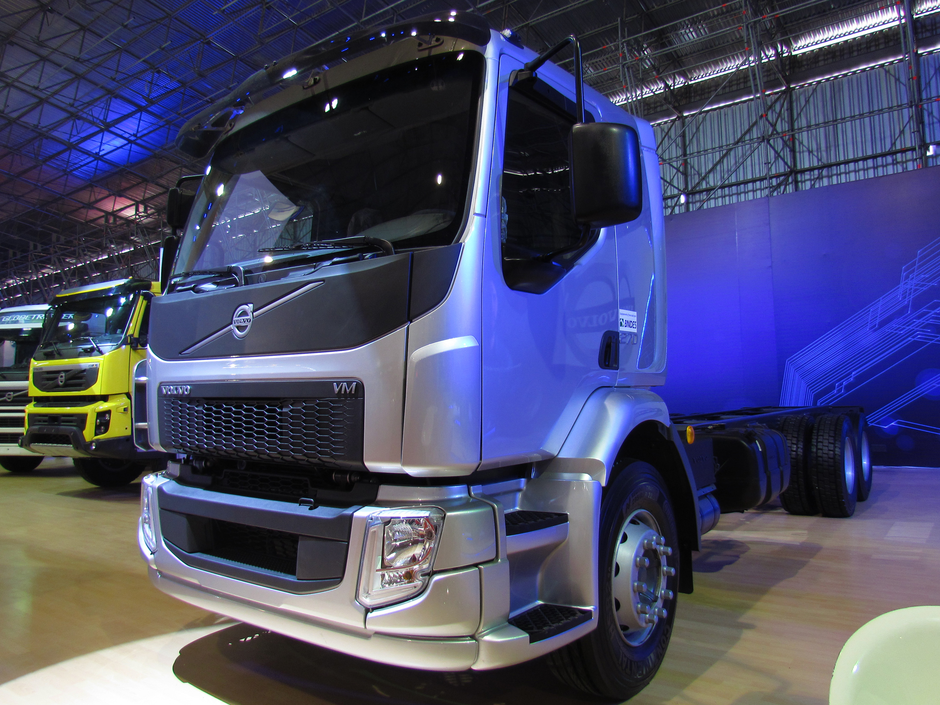 Volvo VM 270 2014